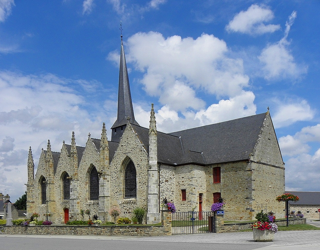 Église Saint-Martin de Moutiers (35). Chevet et flanc sud. .